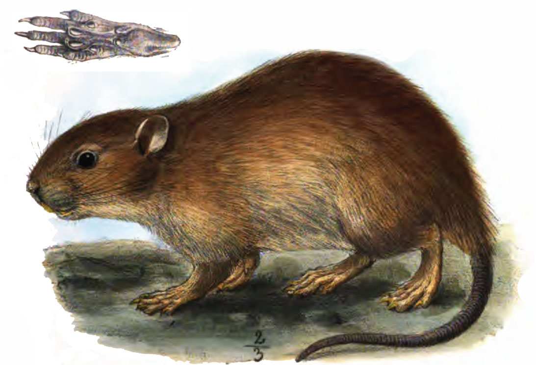 Nesokia huttoni (Syn. Nesokia indica)